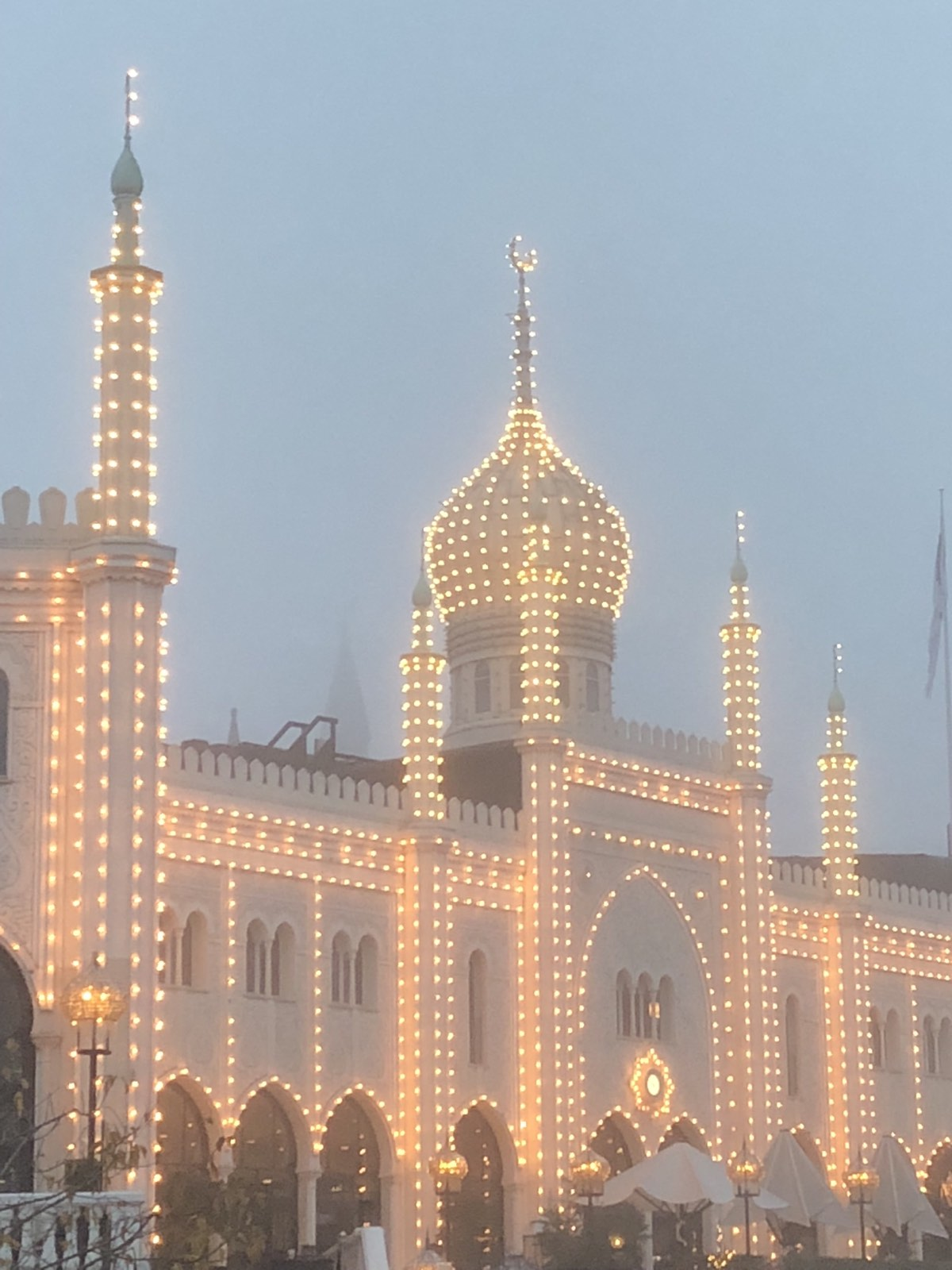 Тиволи Вртови